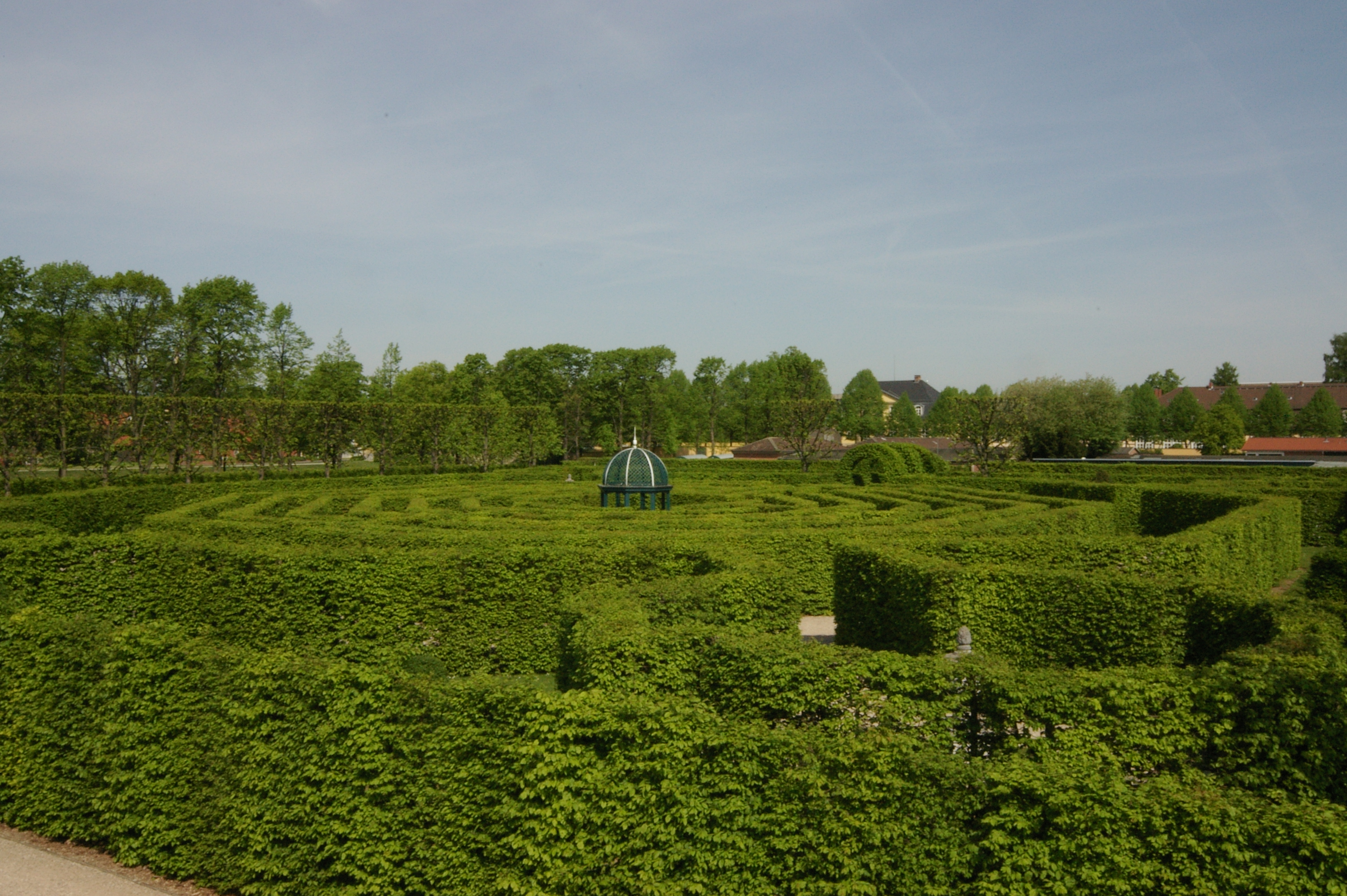 Herrenhausen - Großer Garten - Irrgarten. 2005-05-02